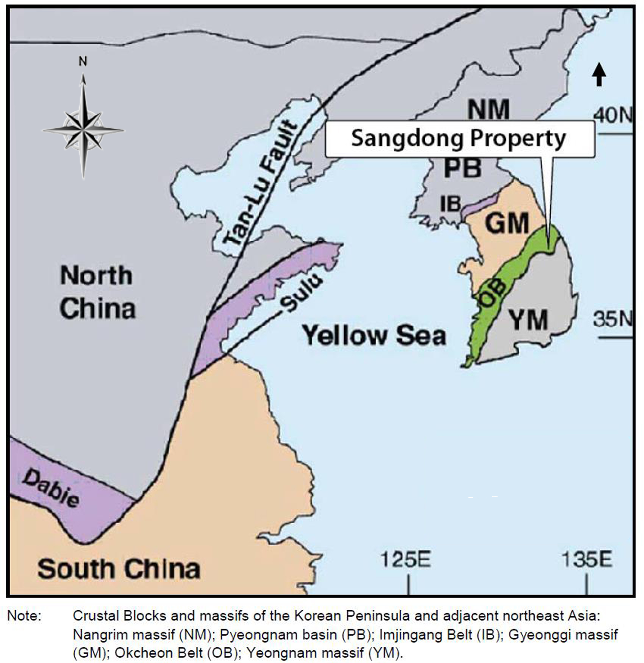 한반도 광역 지질도